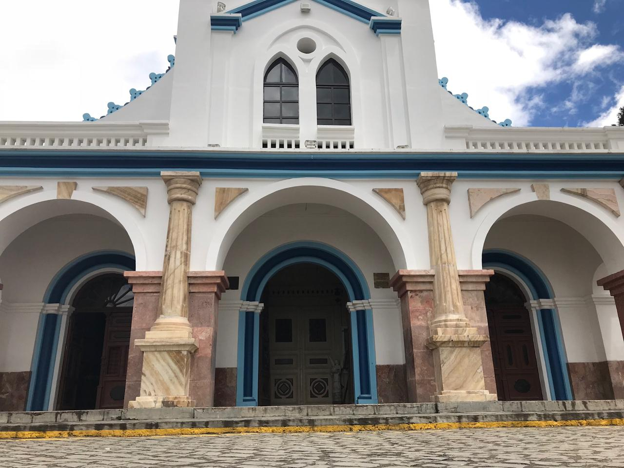 Iglesia Católica de la Santísima Virgen de La Merced de Turi